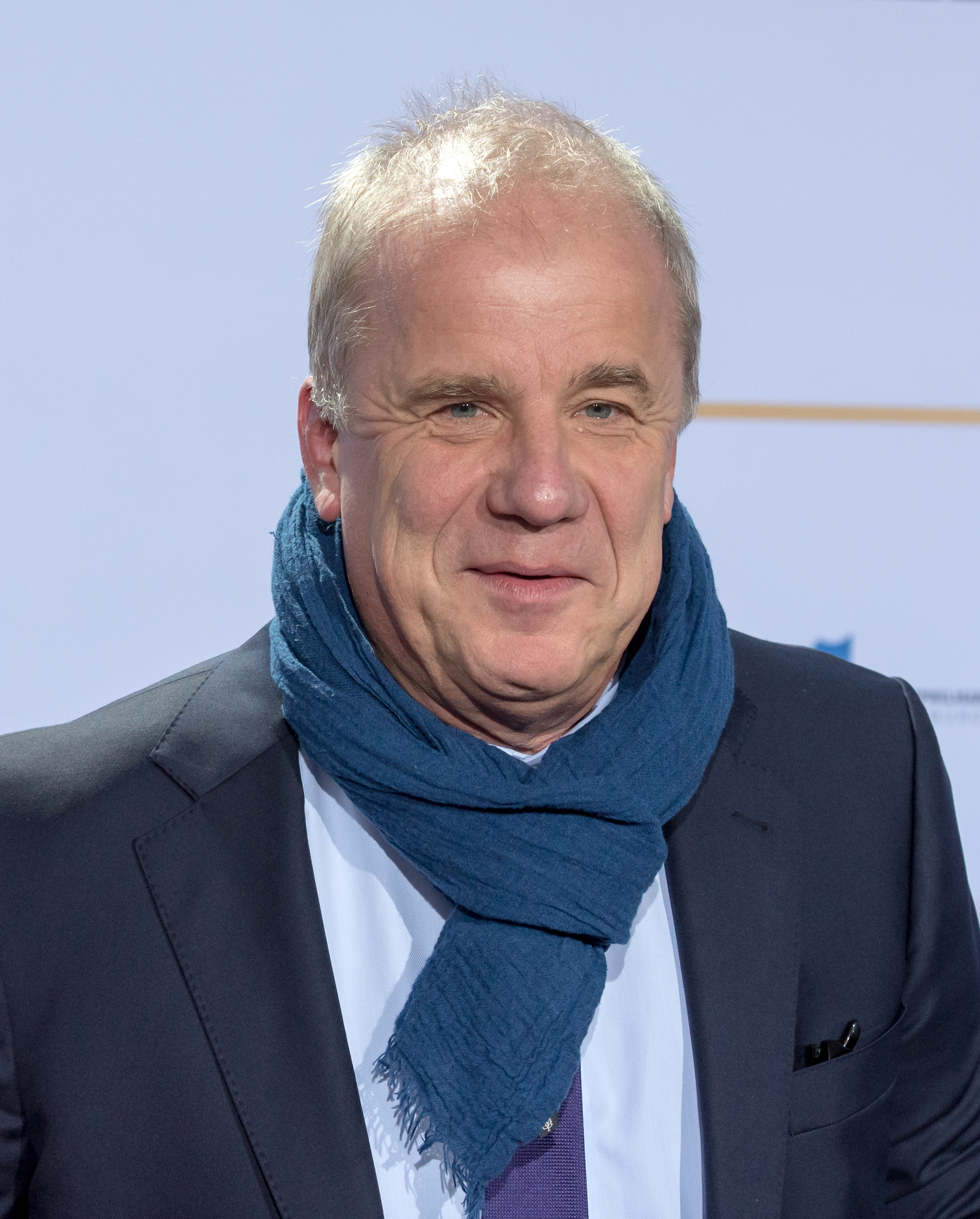 beim Deutschen Radiopreis 2017 im Schuppen 52